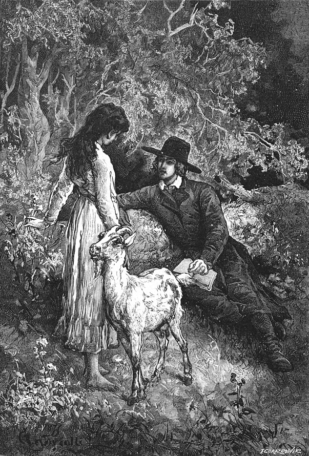 Ilustracje do książki Elizy Orzeszkowej "Meir Ezofowicz"